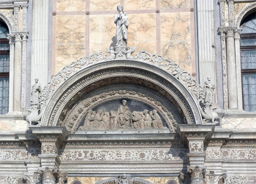 Scuola Grande di San Marco, Venècia. Porta principal